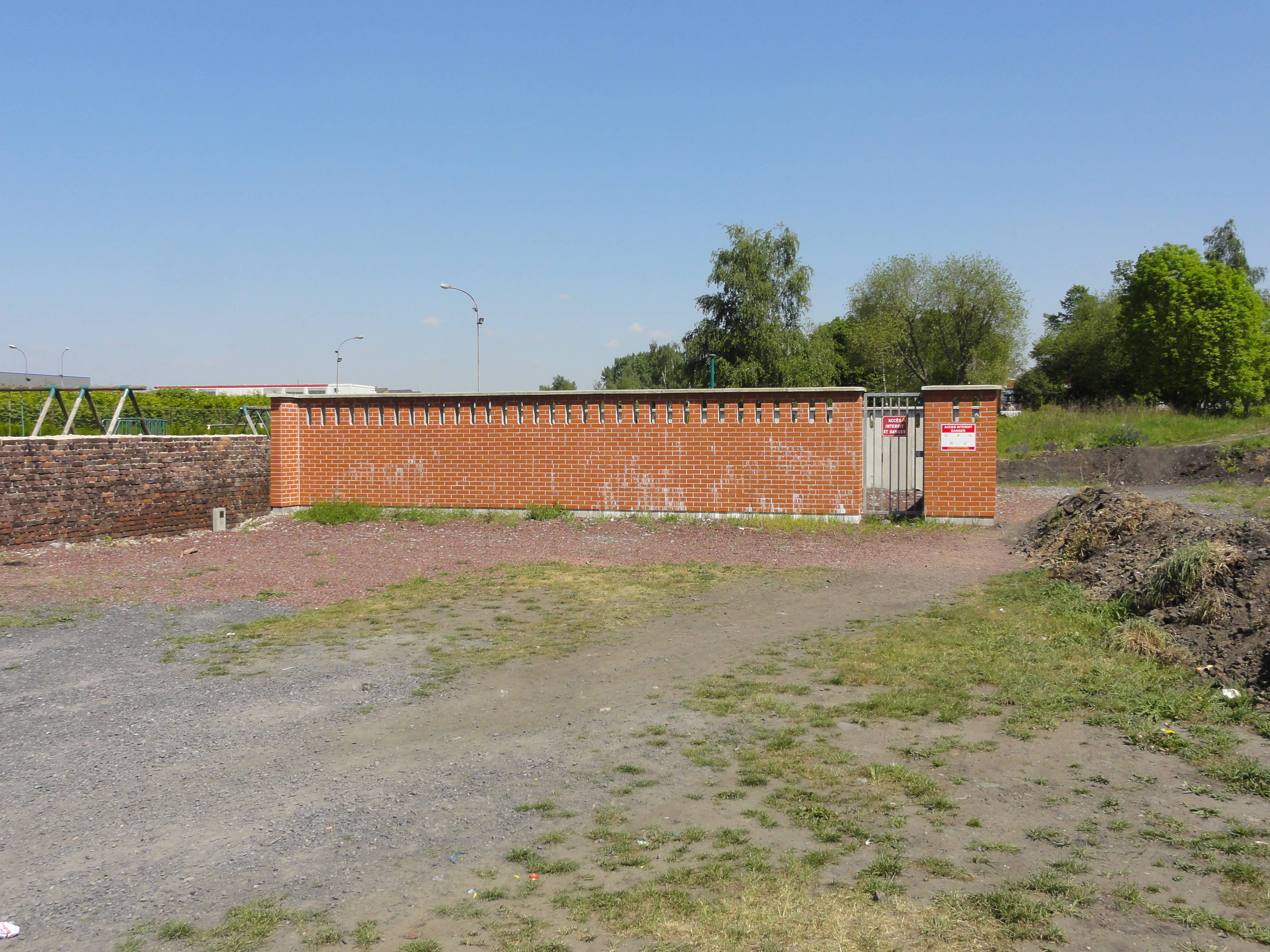 La Fosse Balive de la Compagnie des mines d'Anzin était un charbonnage constitué d'un seul puits situé à Vieux-Condé, Nord, Nord-Pas-de-Calais, France.